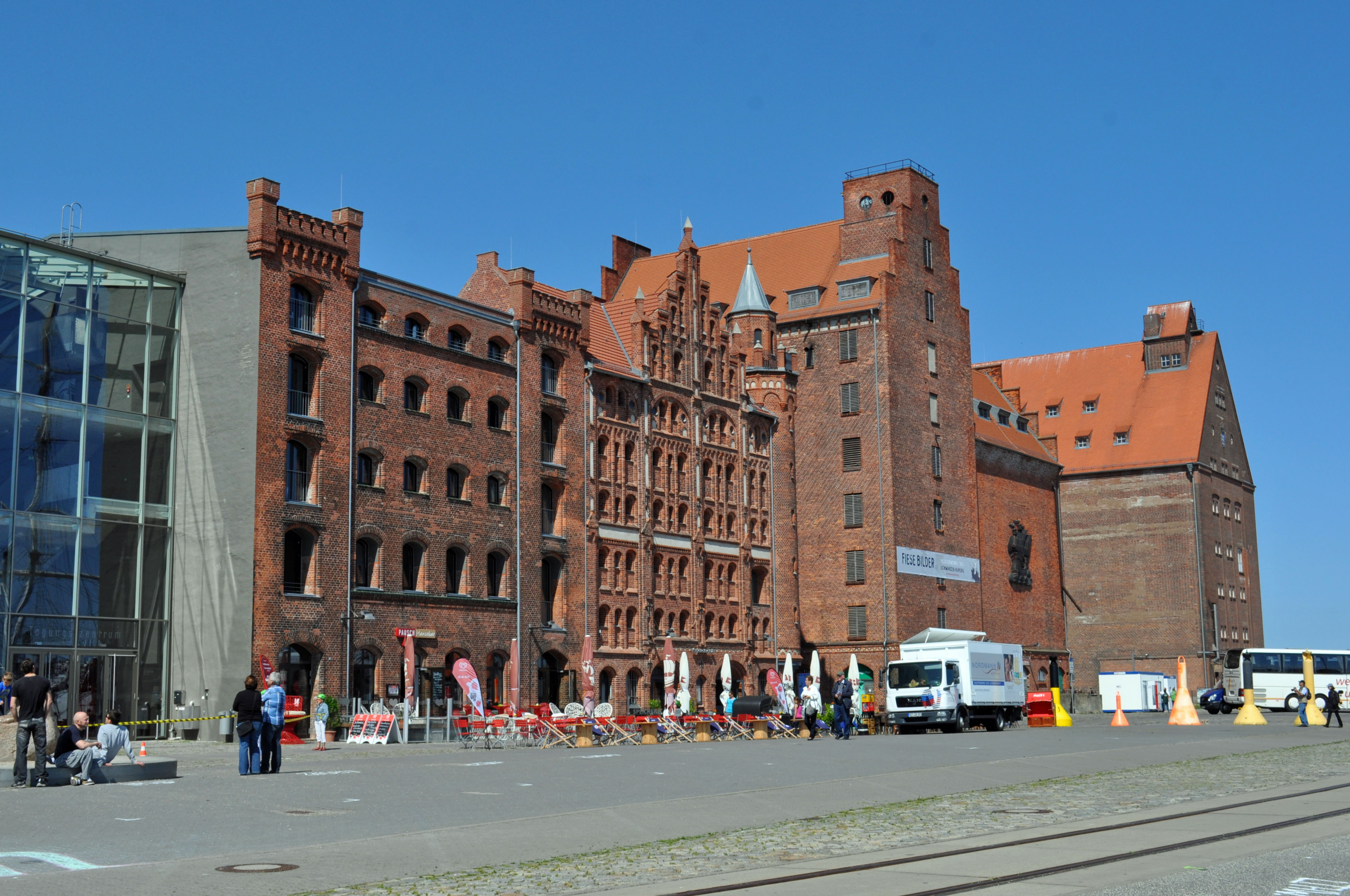 Stralsund, Hafen. Speichergebäude auf der Hafeninsel. Links das Ozeaneum Stralsund.